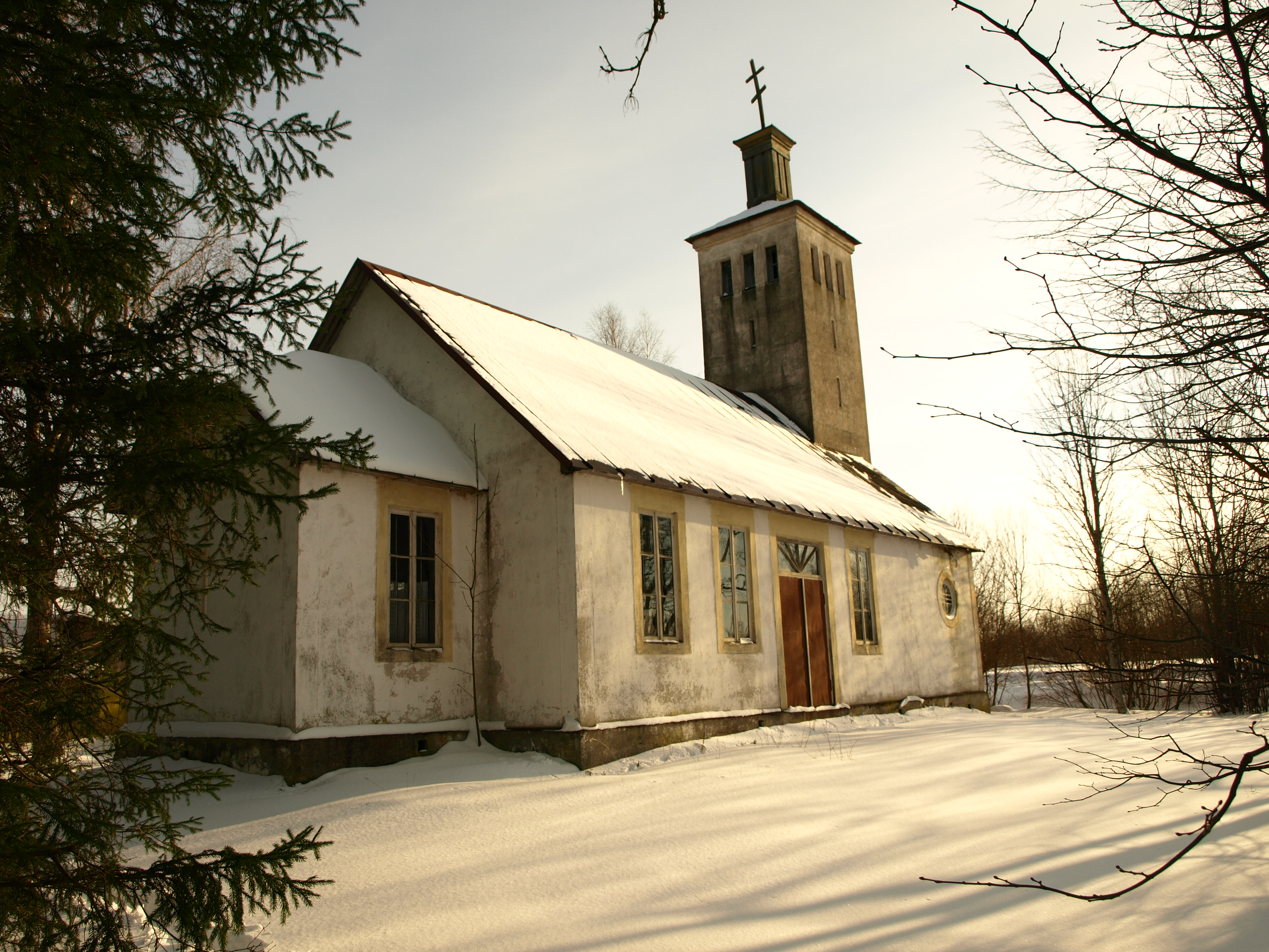 Mõisaküla õigeusu kirik